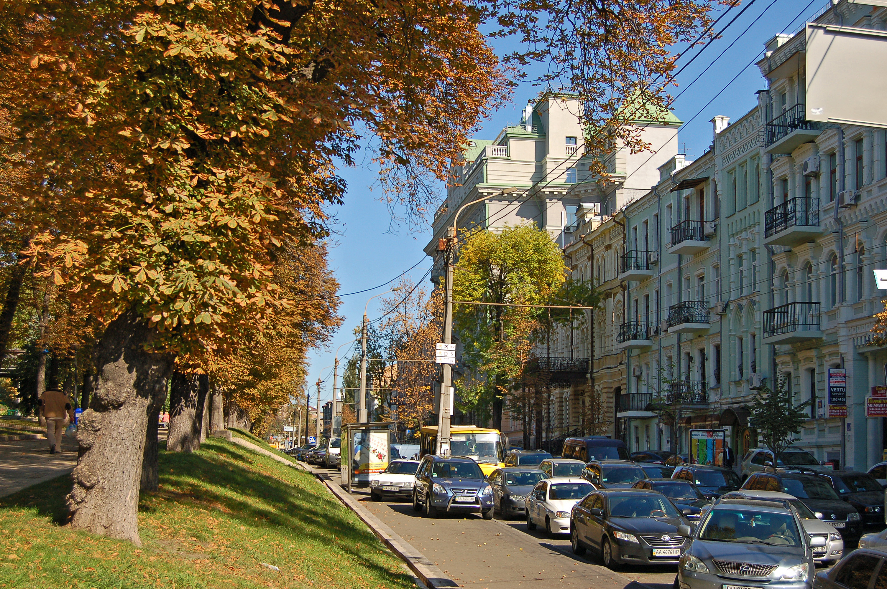 Терещенківська вулиця у Києві